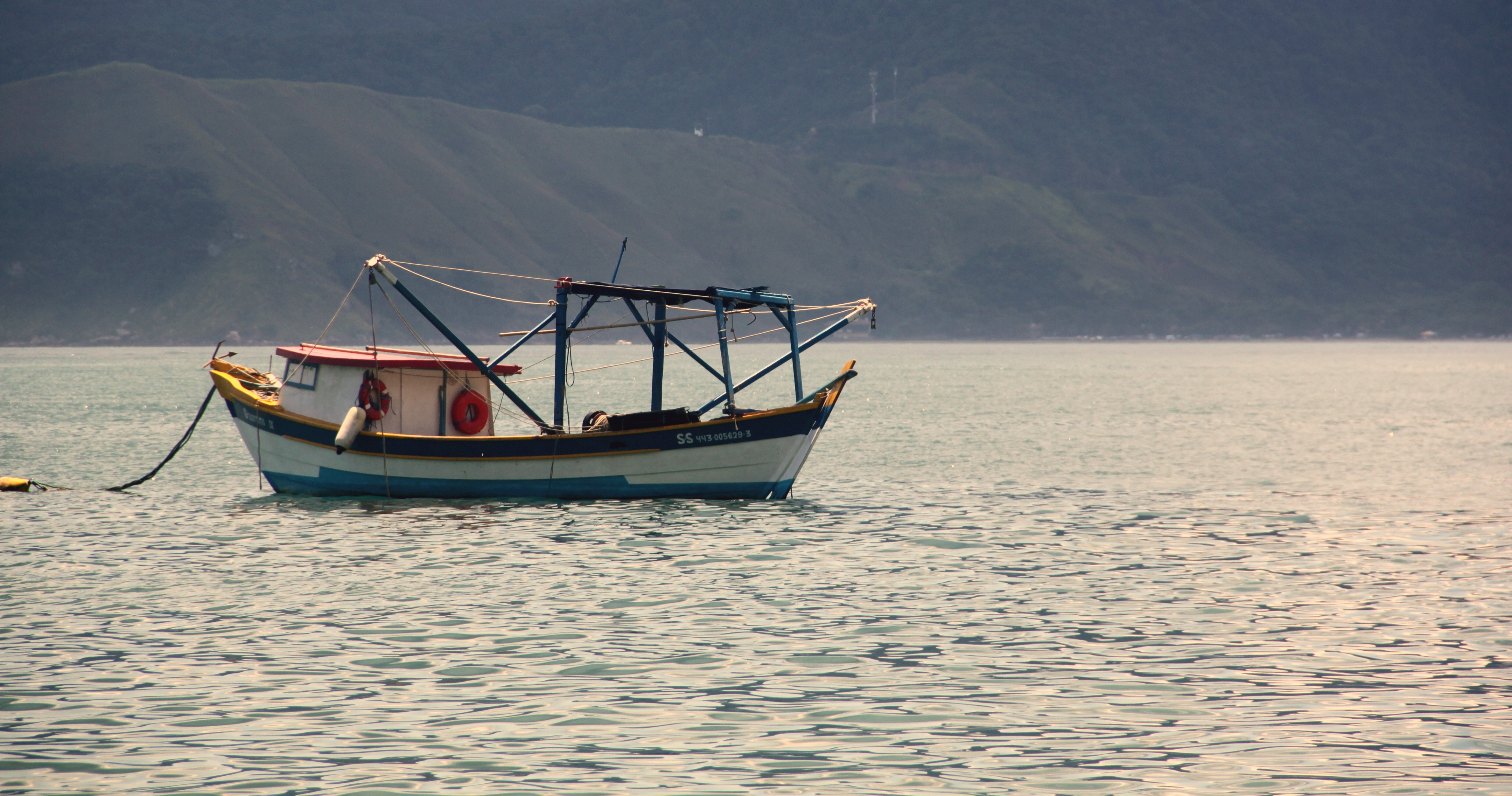 Típicos navios da região.